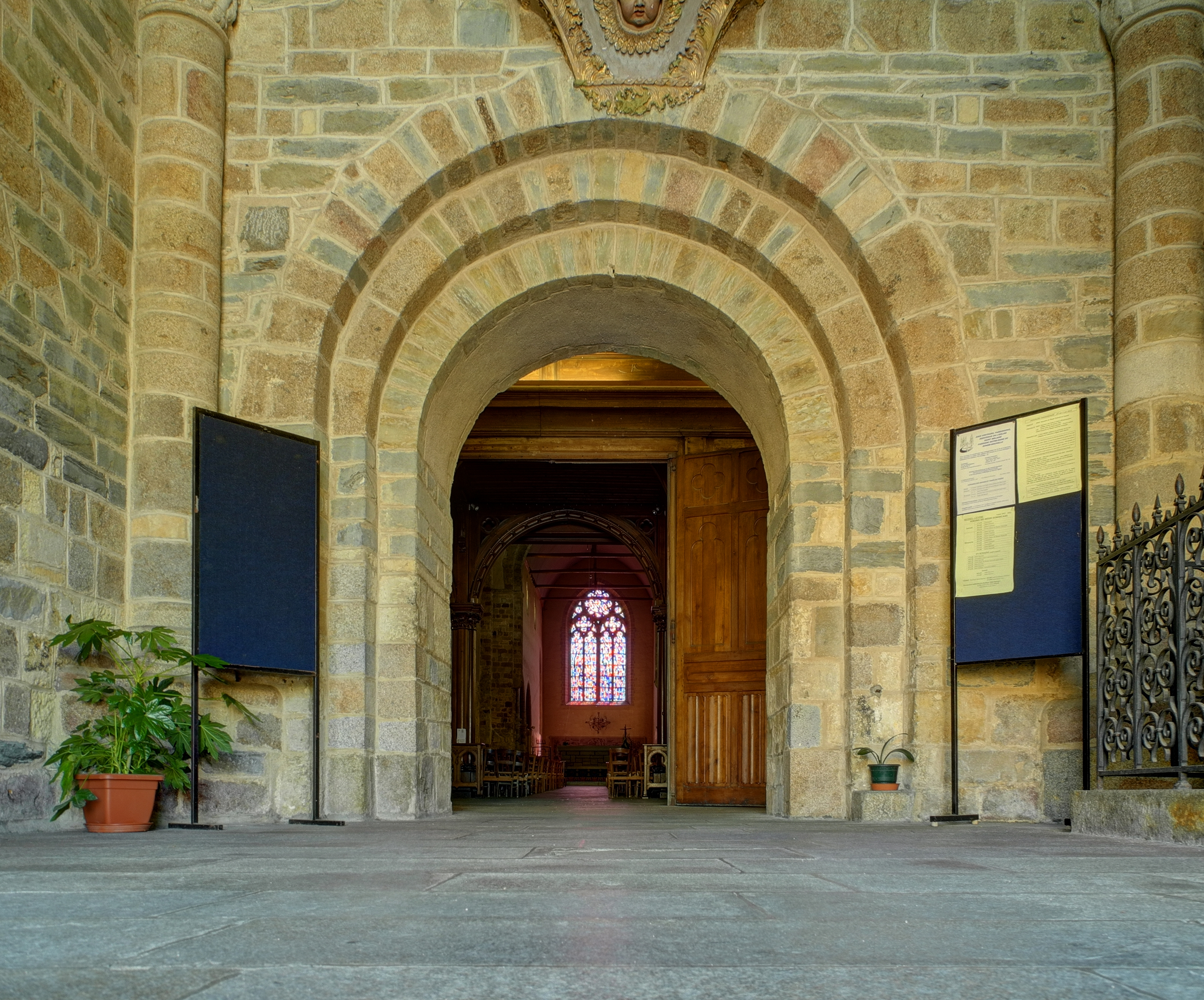 Église Notre-Dame-en-Saint-Melaine, à Rennes (HDR).